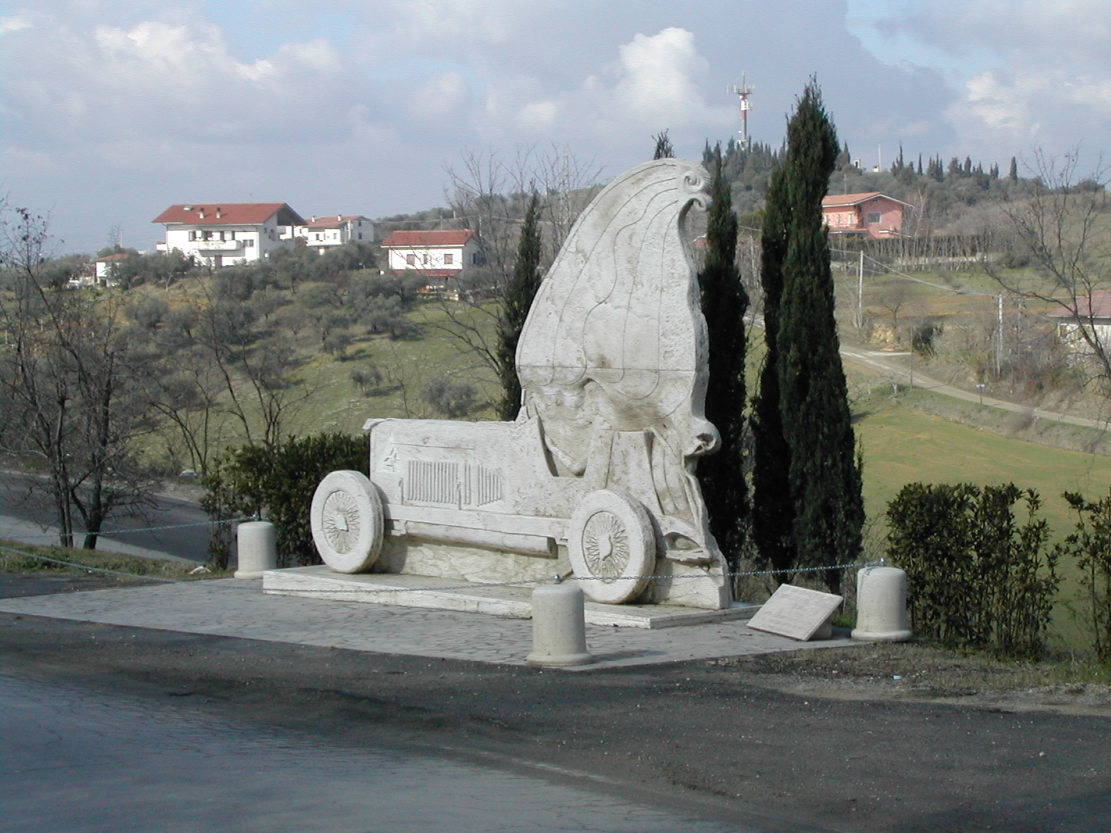 Scultura ricordo della Coppa Acerbo, realizzata da Igor Cascella.